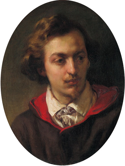 Bildnis des Berliner Malers Wilhelm Amberg.